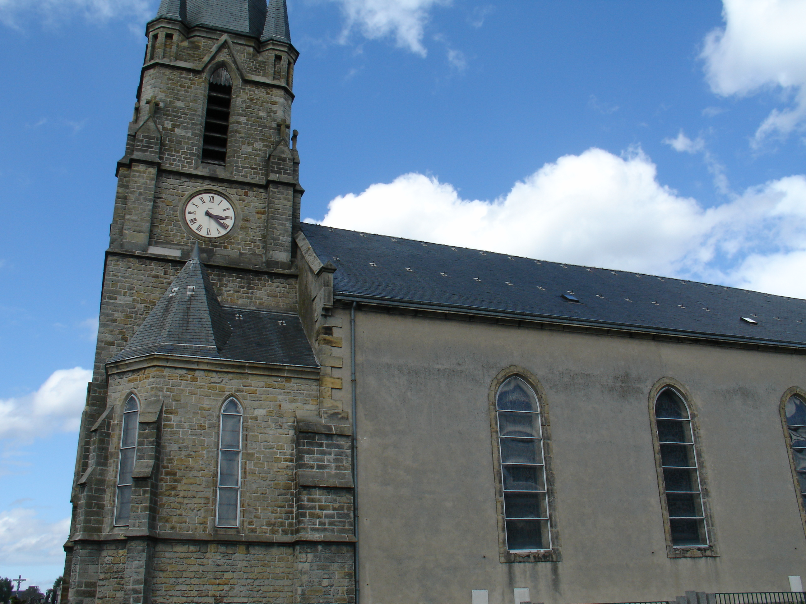 L'Église Saint-Nicolas de L'Hôpital.